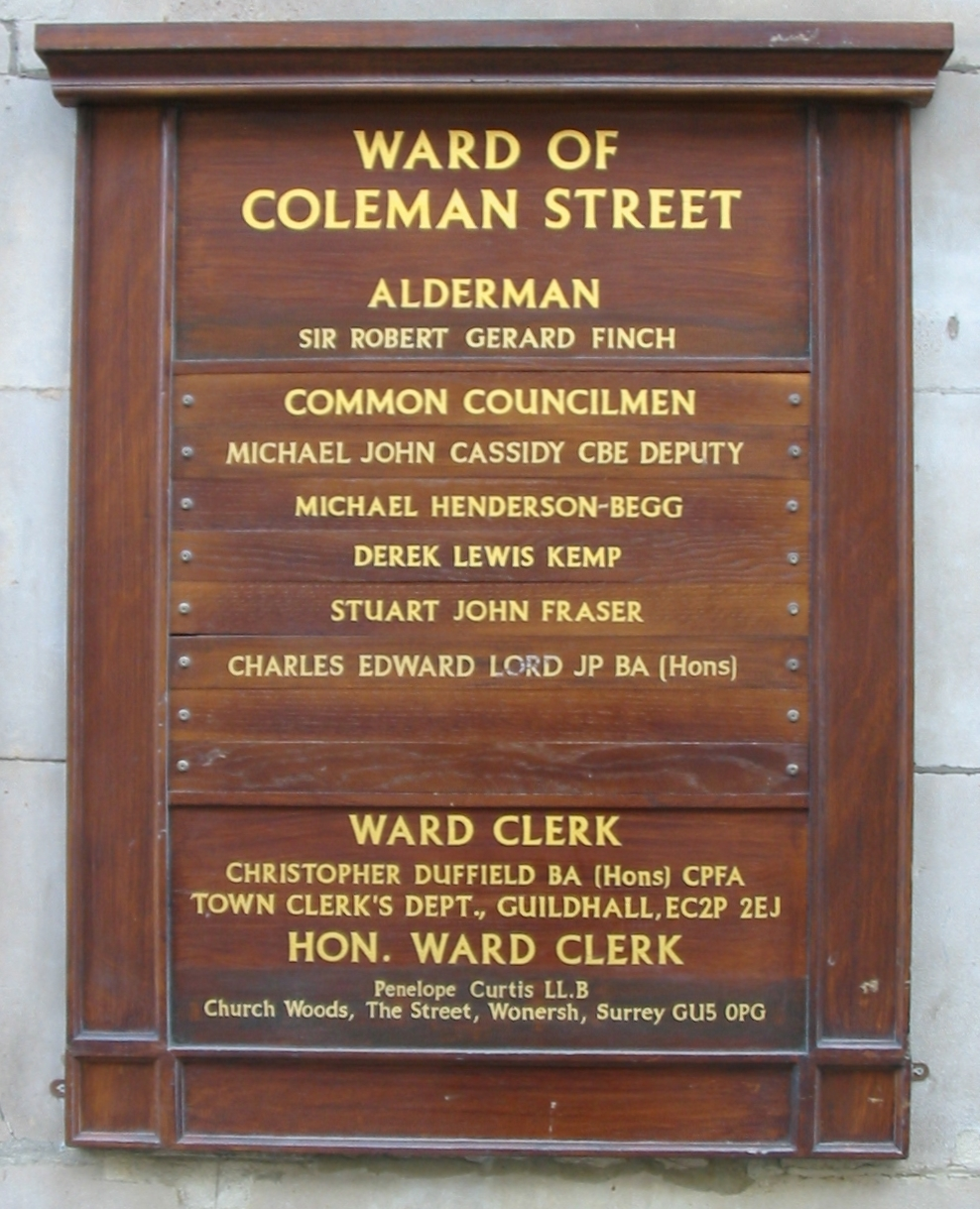 Nrf: Pliaque à Londres